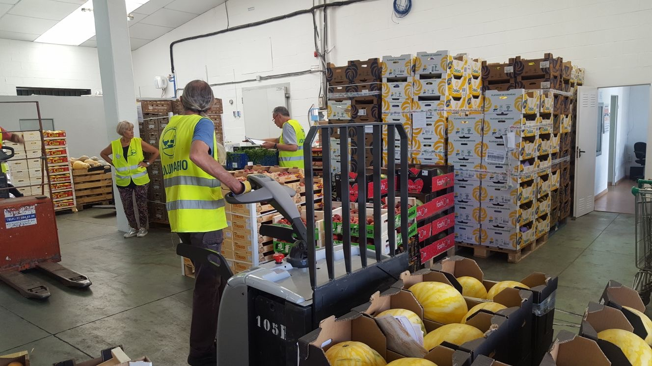 Las empresas mayoristas de Mercamadrid y sus clientes minoristas no han faltado a la cita con la solidaridad de hoy, la Operación Caja, organizada por el Banco de Alimentos de Madrid. Un compromiso que ha dado lugar a la donación de 34.000 kg. de alimentos, superando en un 80% la cifra alcanzada en la jornada celebrada hace un año en el que se computaron 19.000 kg.